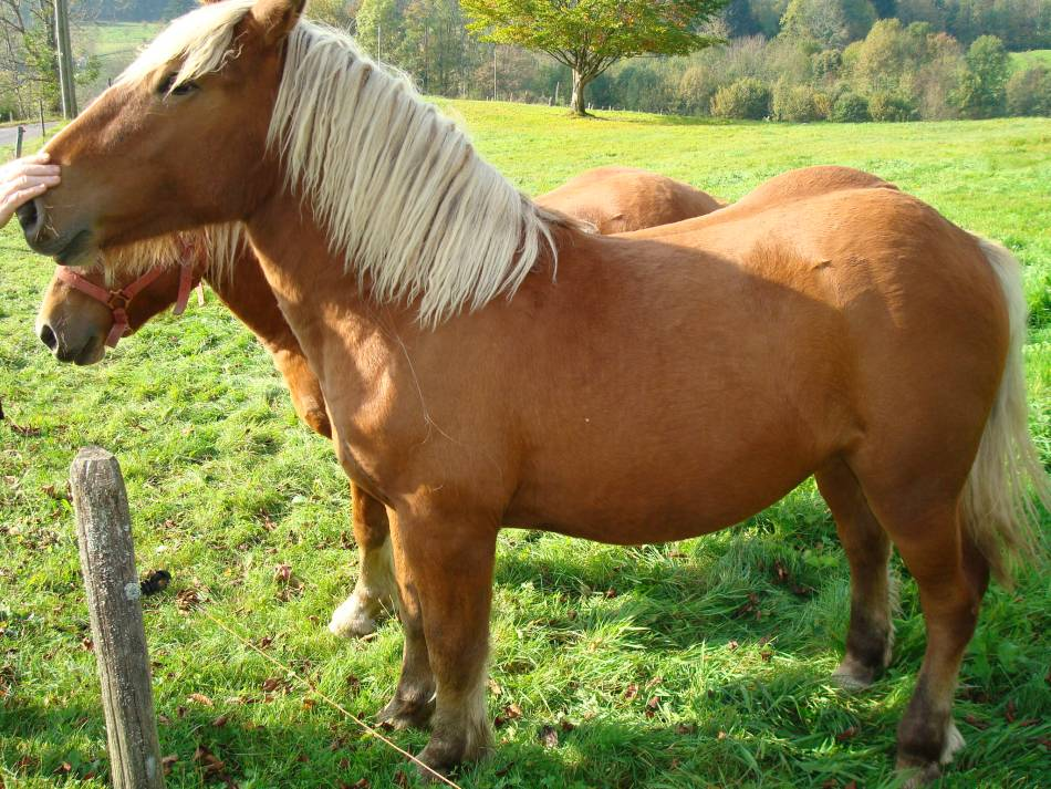 Cheval de race "Comtois" (Franche-Comté, France)